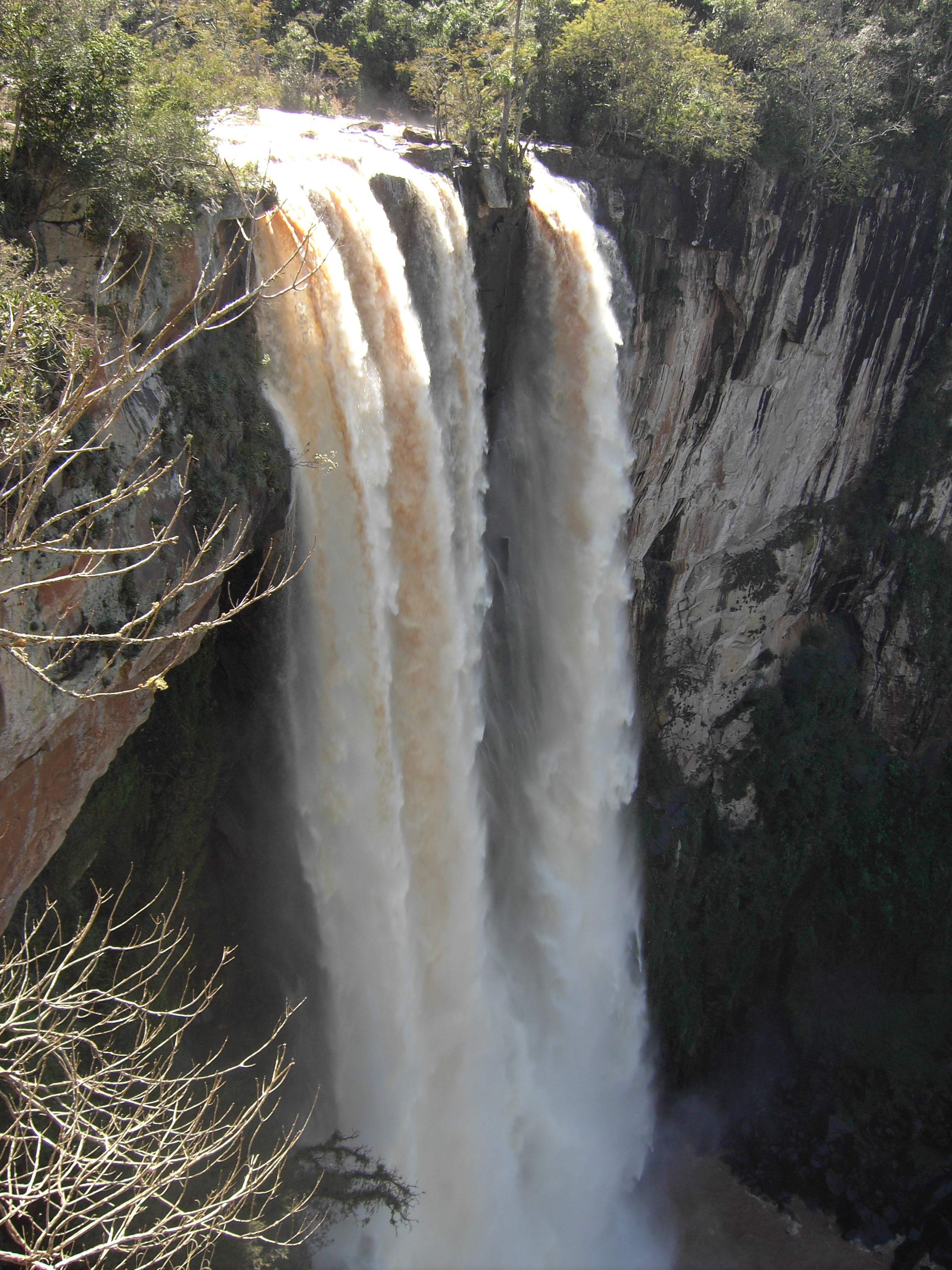 Template:Salto do Apucaraninha, Londrina-PR, Brasil